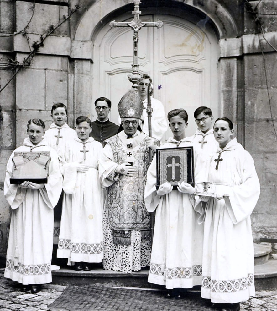 L'archevêque Maurice-Louis Dubourg en 1939.